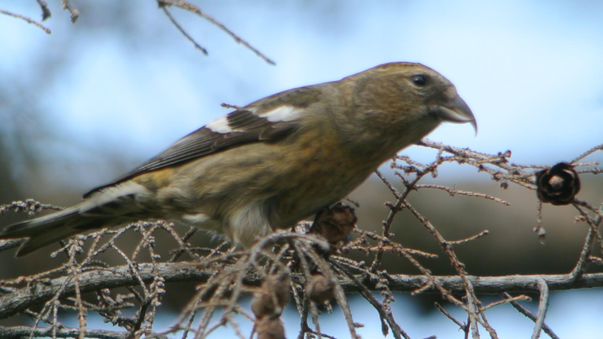 Carondelet Park in St. Louis MO on 12/2/12